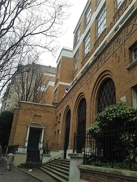 Cité Montmartre-aux-artistes (1929-1936, Adolphe Thiers architecte), 189 rue Ordener, Paris 18e. Façade rapprochée et partie de l'atrium de gauche.